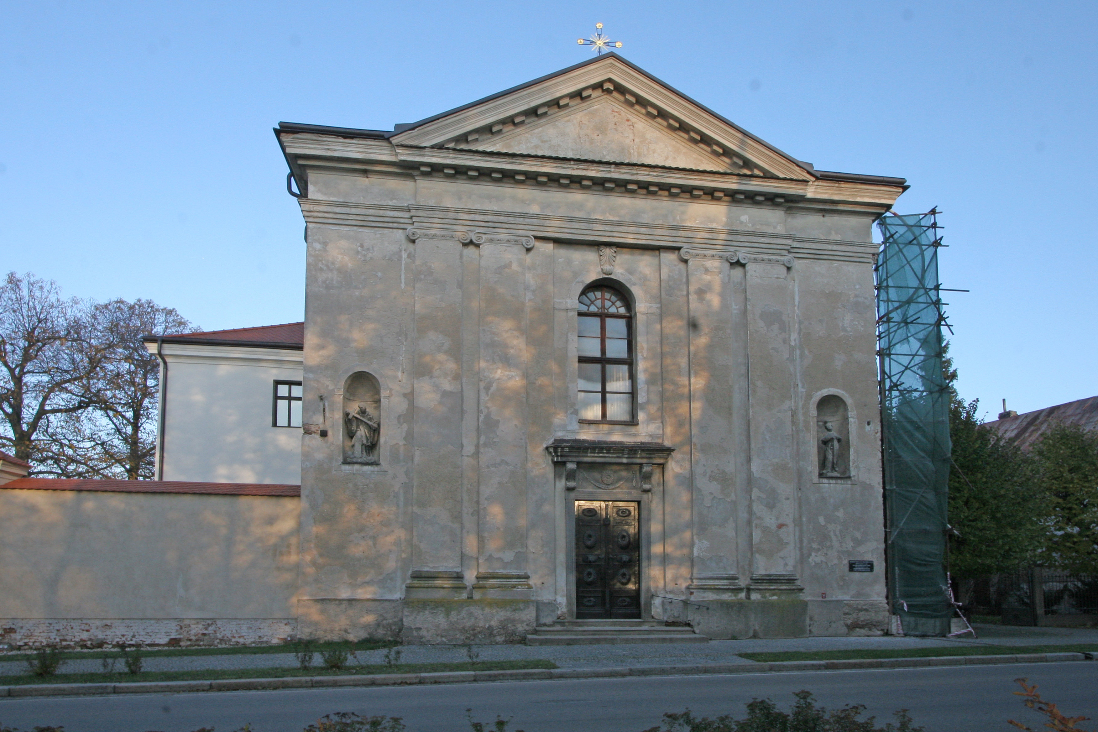 Kostel sv. Františka Serafinského (Golčův Jeníkov), Mírová, Golčův Jeníkov